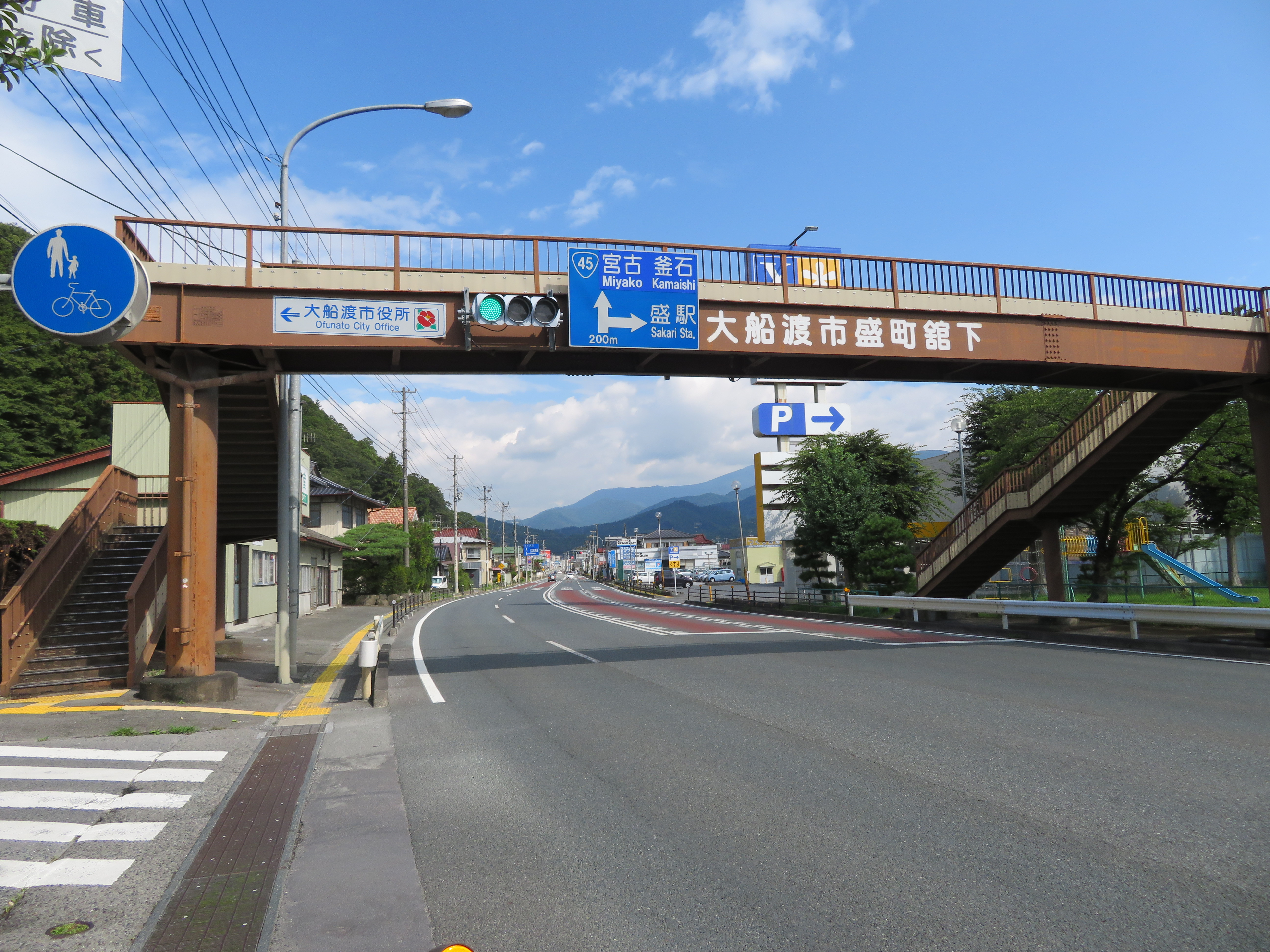 国道45号大船渡バイパス 岩手県大船渡市盛町館下付近(釜石方面を撮影）